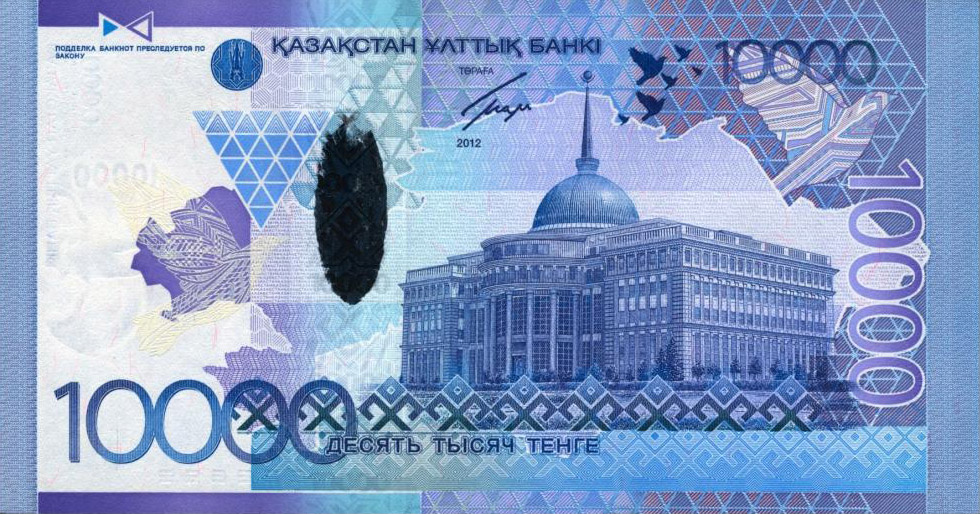 10000 тенге 2012 года